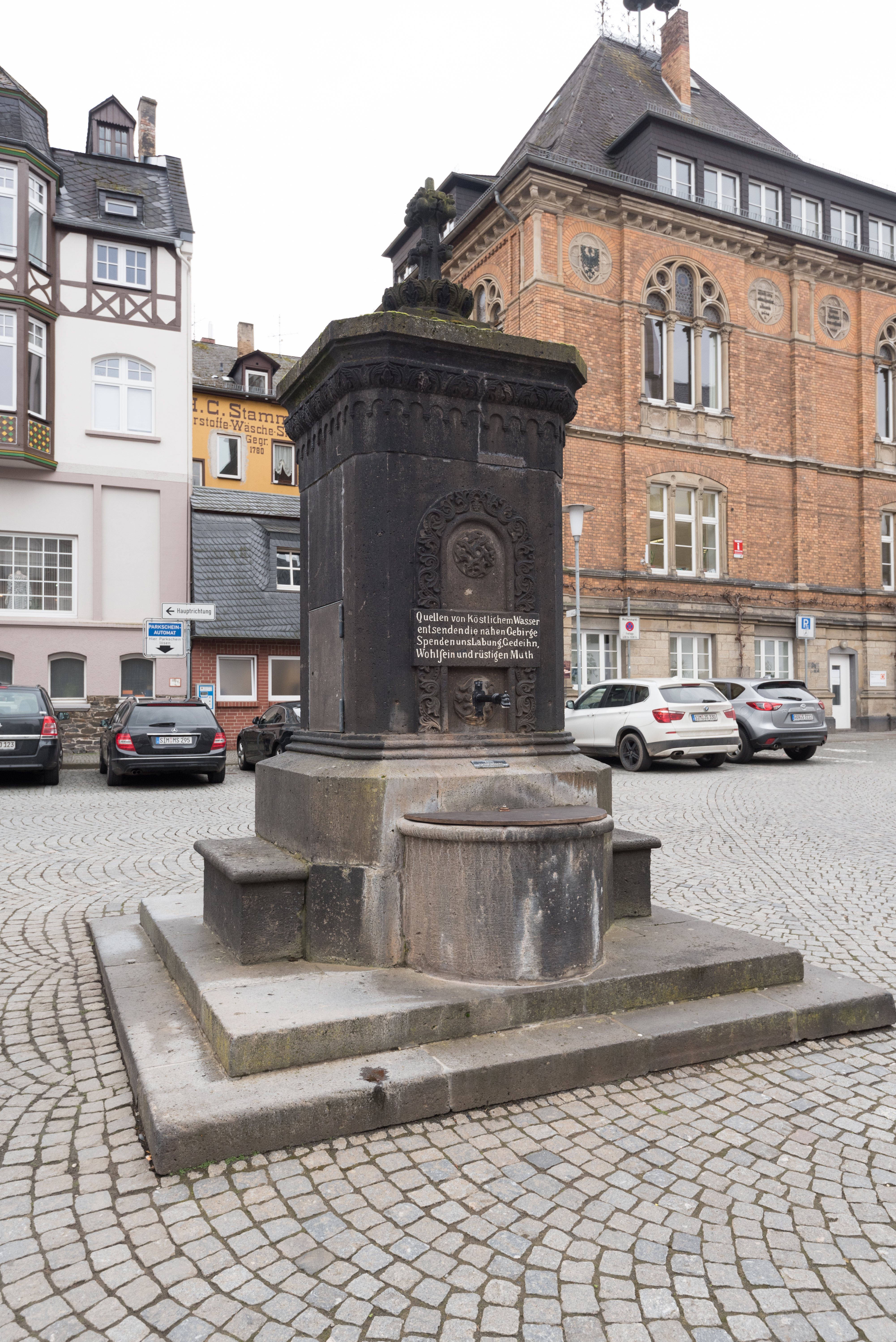 Boppard, Marktplatz, Brunnen